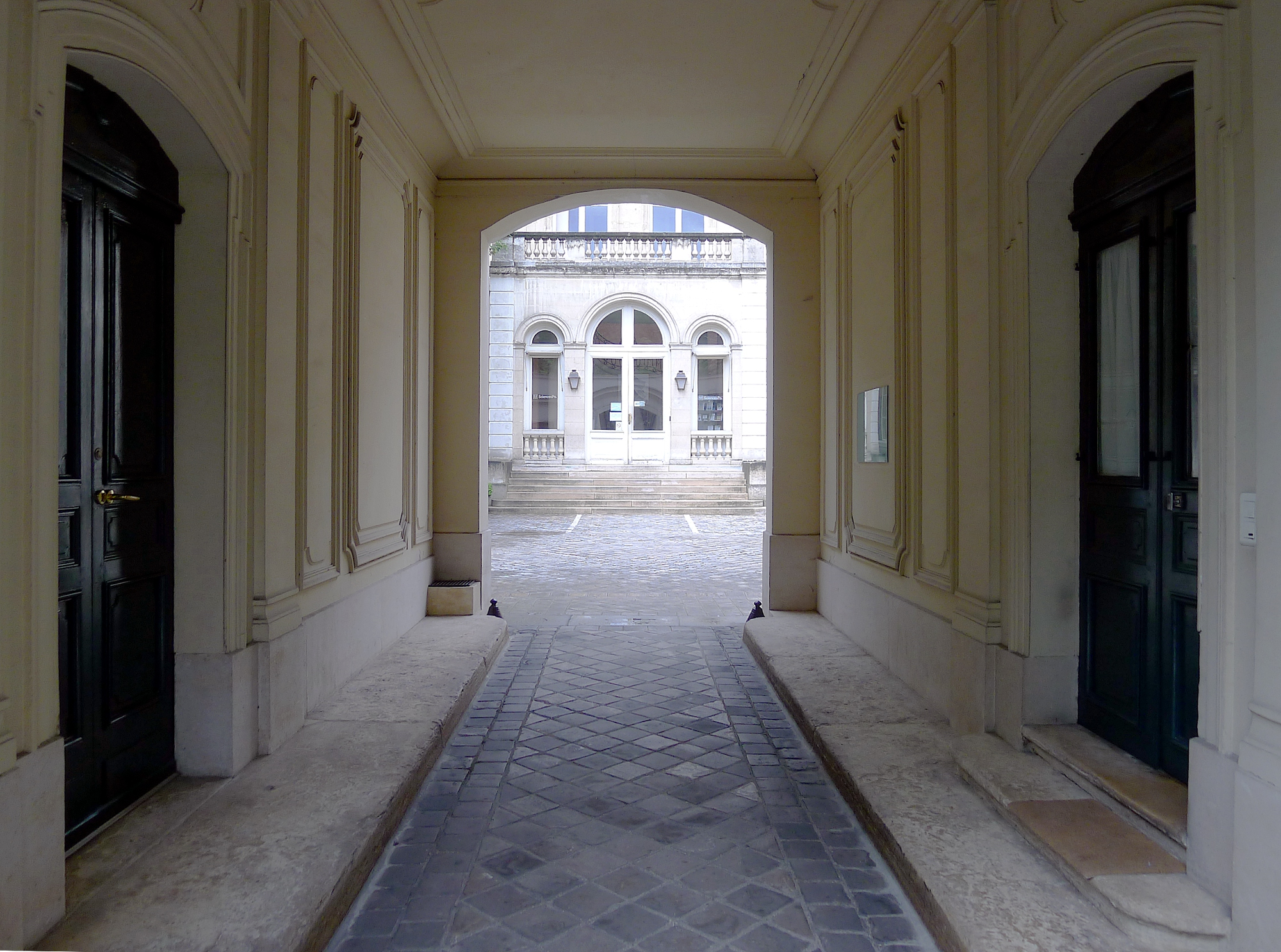 Rue de l'Université (n°98) - Paris VII